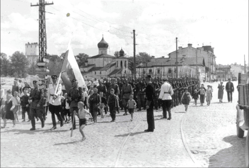 Парад РОА в Пскове 22 июня 1943 года. Знаменосец граф Г. П. Ламсдорф.